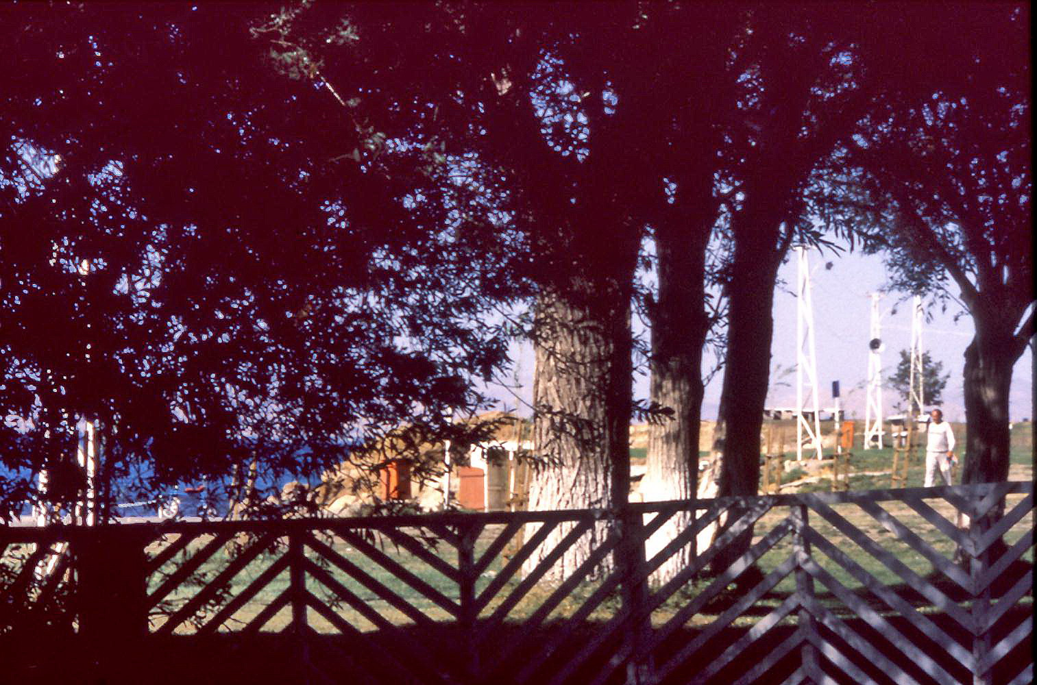 Lieu de villégiature près d'Edremit.